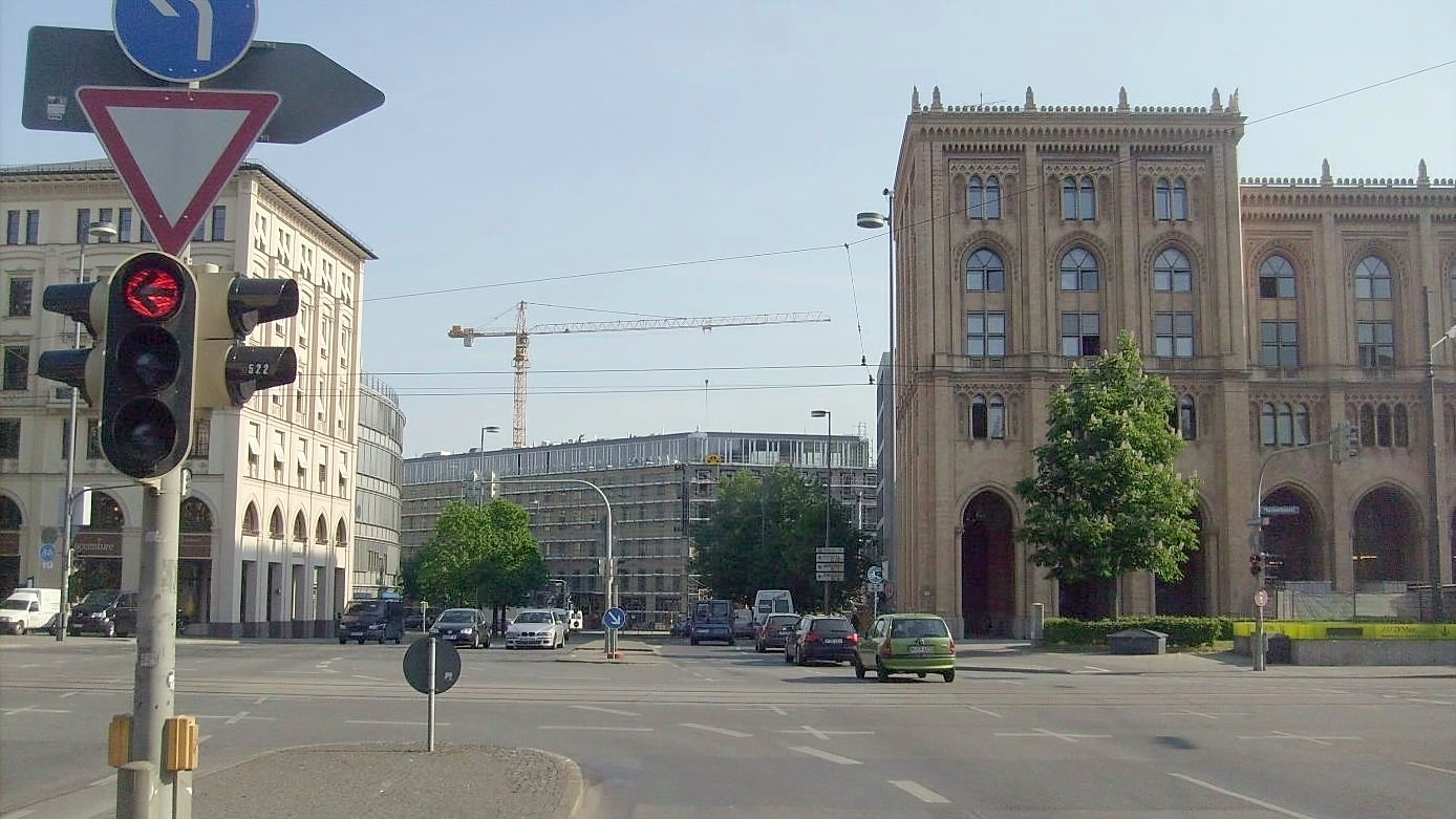 München _ 15.05.2008